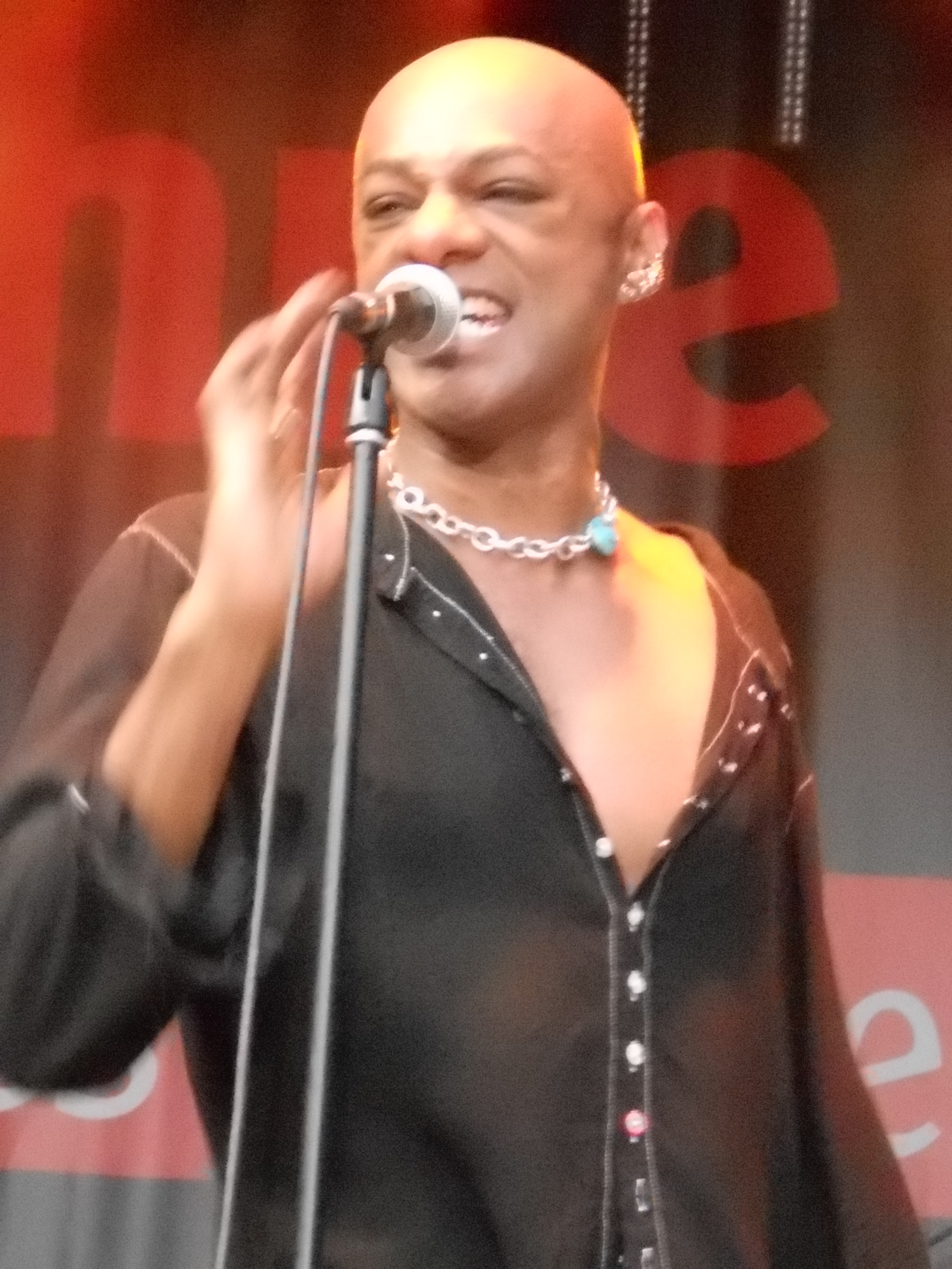 Percival Duke von The Voice of Germany beim Niedersächsischen Landesturnfest in Osnabrück